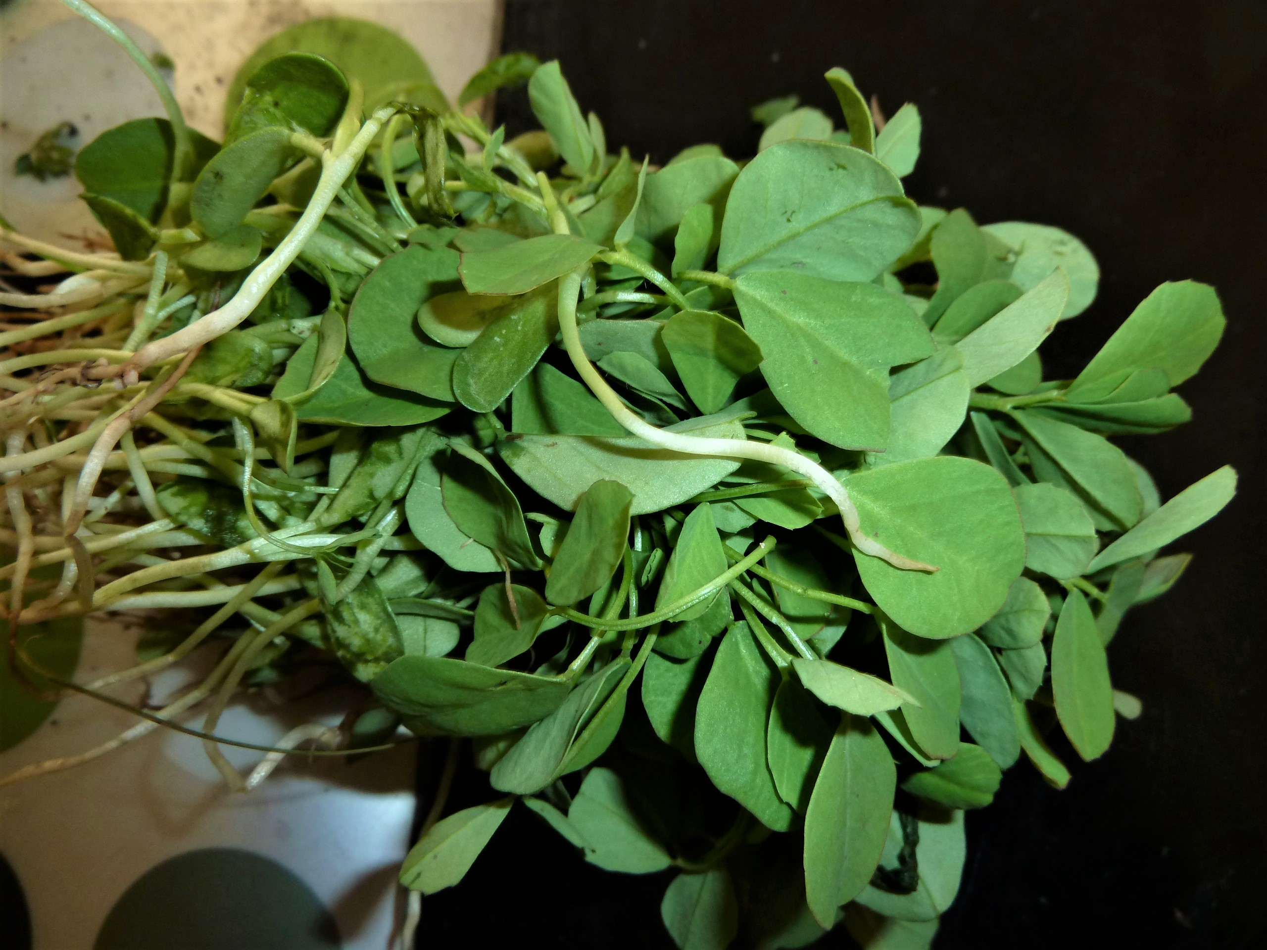 మెంతికూర కట్ట